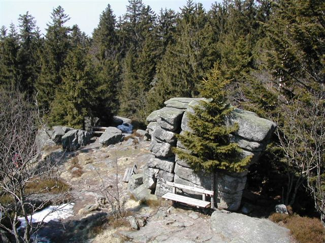 Bärenstein